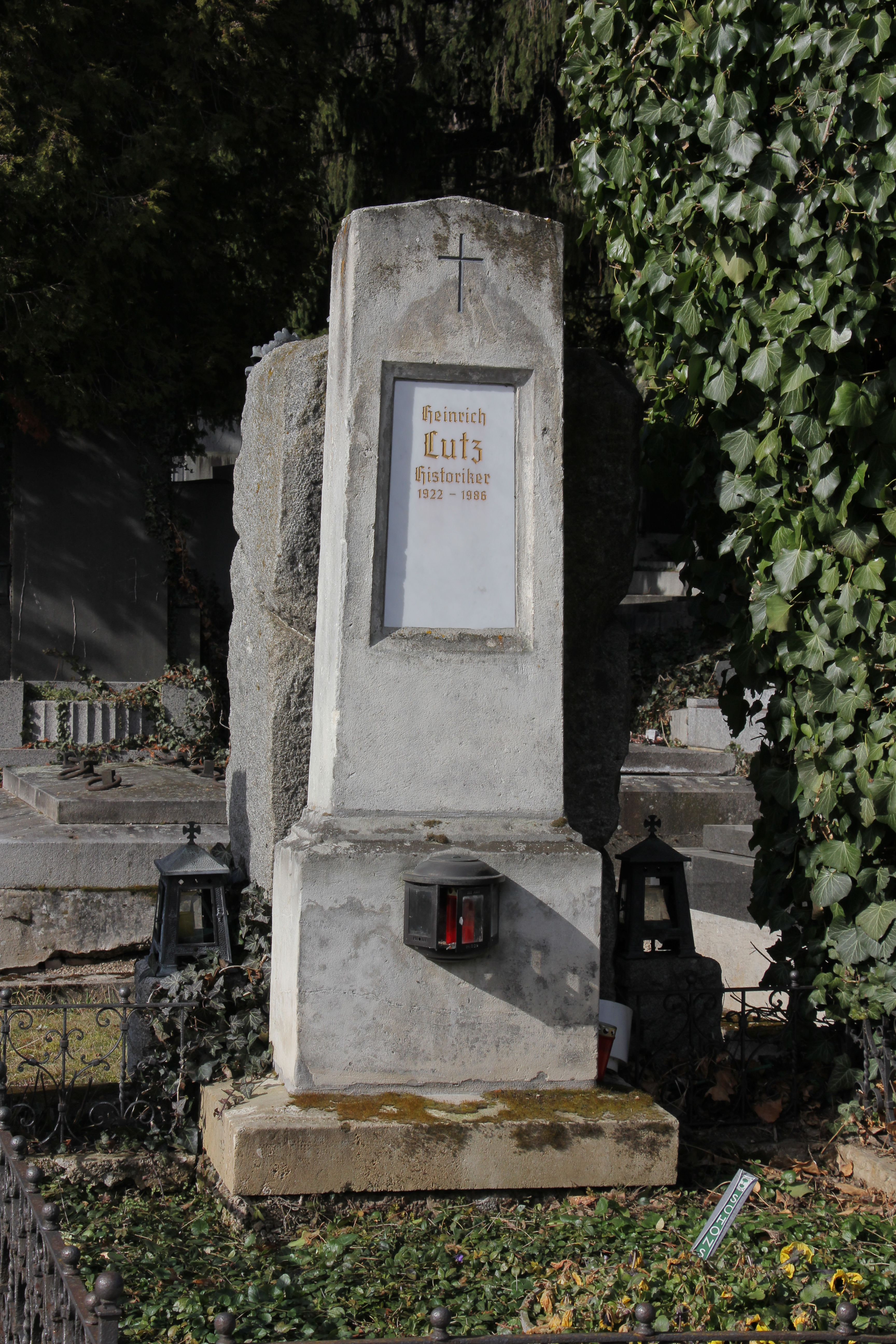 Grab des Historikers Heinrich Lutz am Friedhof in der Hinterbrühl